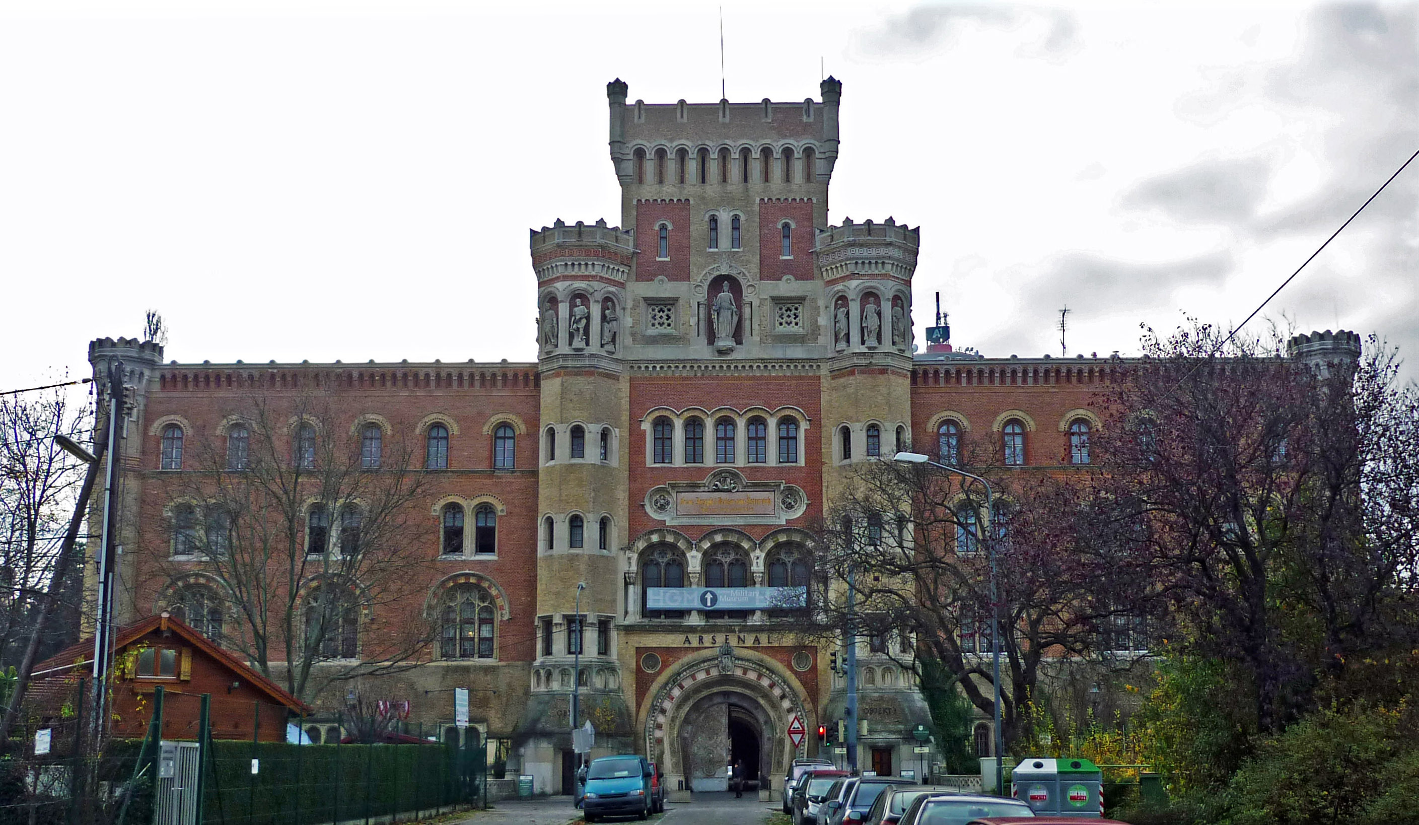 Arsenal Wien, Ghegastraße